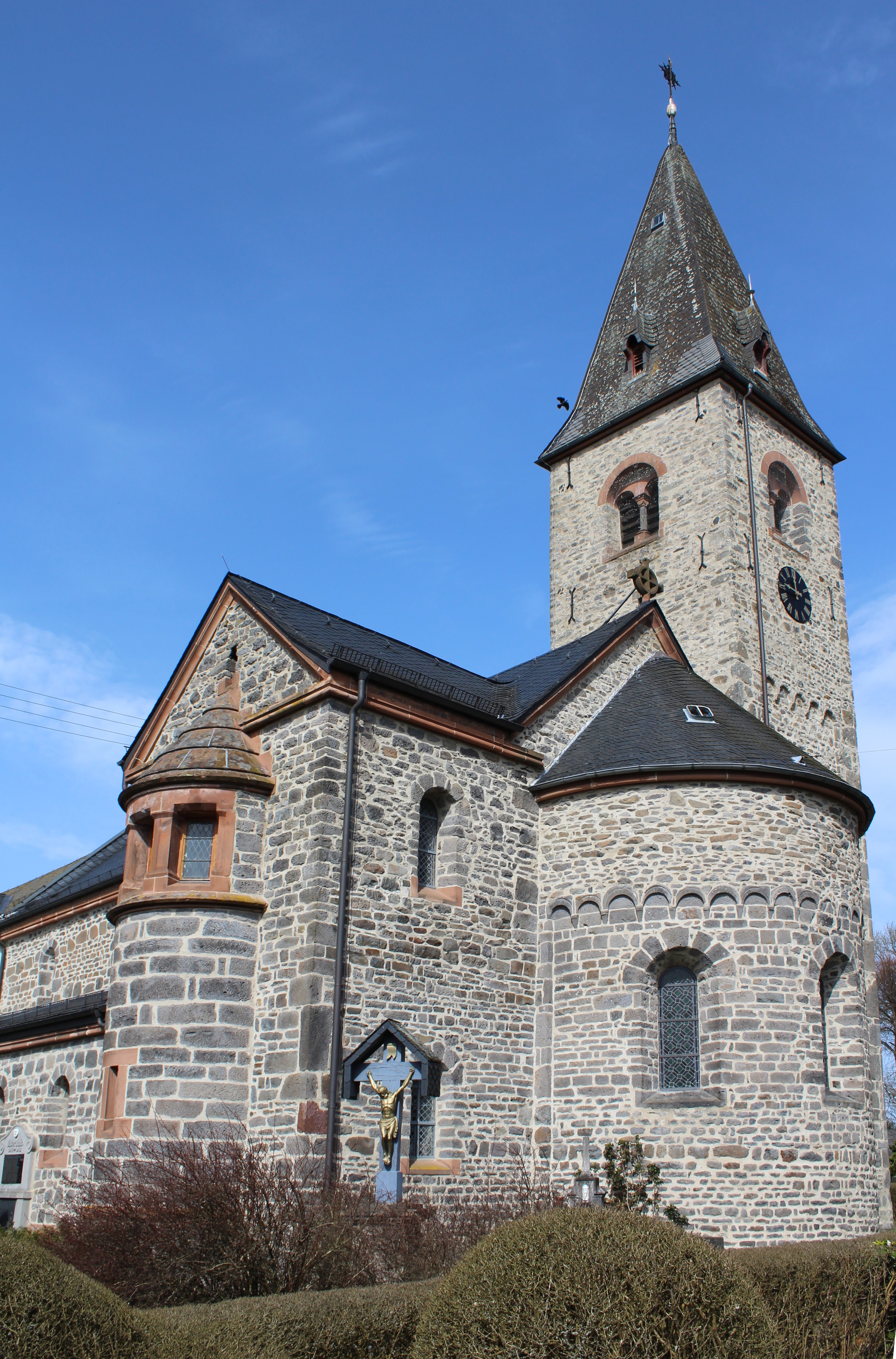 Kath. Pfarrkirche St. Kilian in Seck, Westerwaldkreis, Rheinland-Pfalz, Deutschland